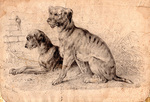 Dibujo de Perros de Agustina Gutiérrez Salazar, pintora y dibujante. Nació en 1851 en San Fernando, Chile. Murió en Santiago en Septiembre de 1886. Considerada como la primera mujer que ingresó a la Academia de Pintura en Chile en 1866, cuando contaba con quince años. Fue alumna de Alejandro Ciccarelli y en 1869, fue nombrada profesora de dibujo por el Supremo Gobierno, siendo una de las iniciadoras de la disciplina como enseñanza Oficial.